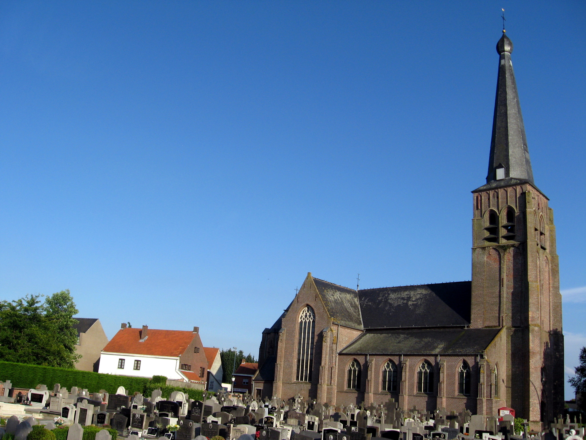 Parochiekerk Sint-Valentinus in Poppel